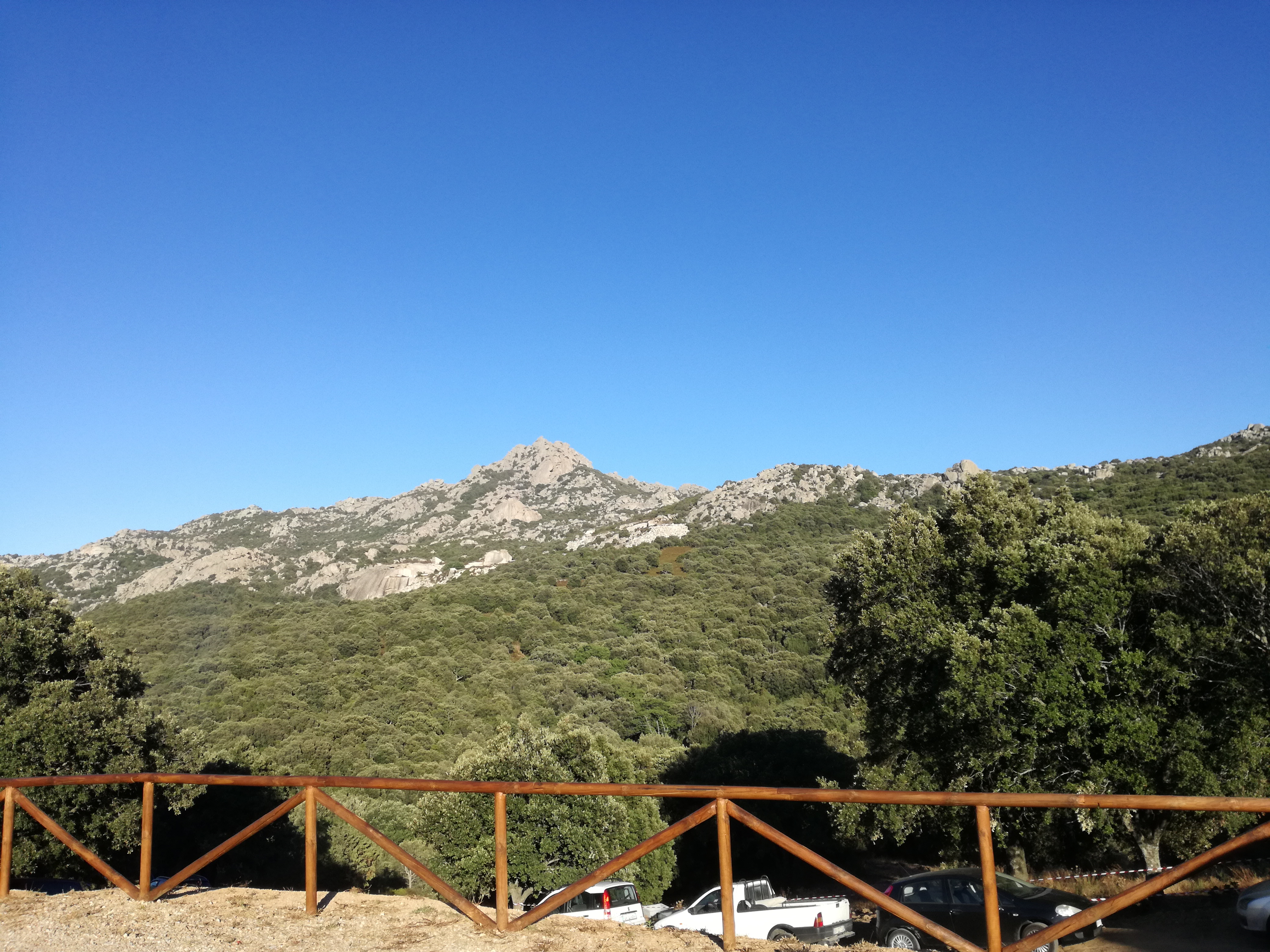 Panoramica della valle di Valentino, dal parco di San Tommaso, a Calangianus.